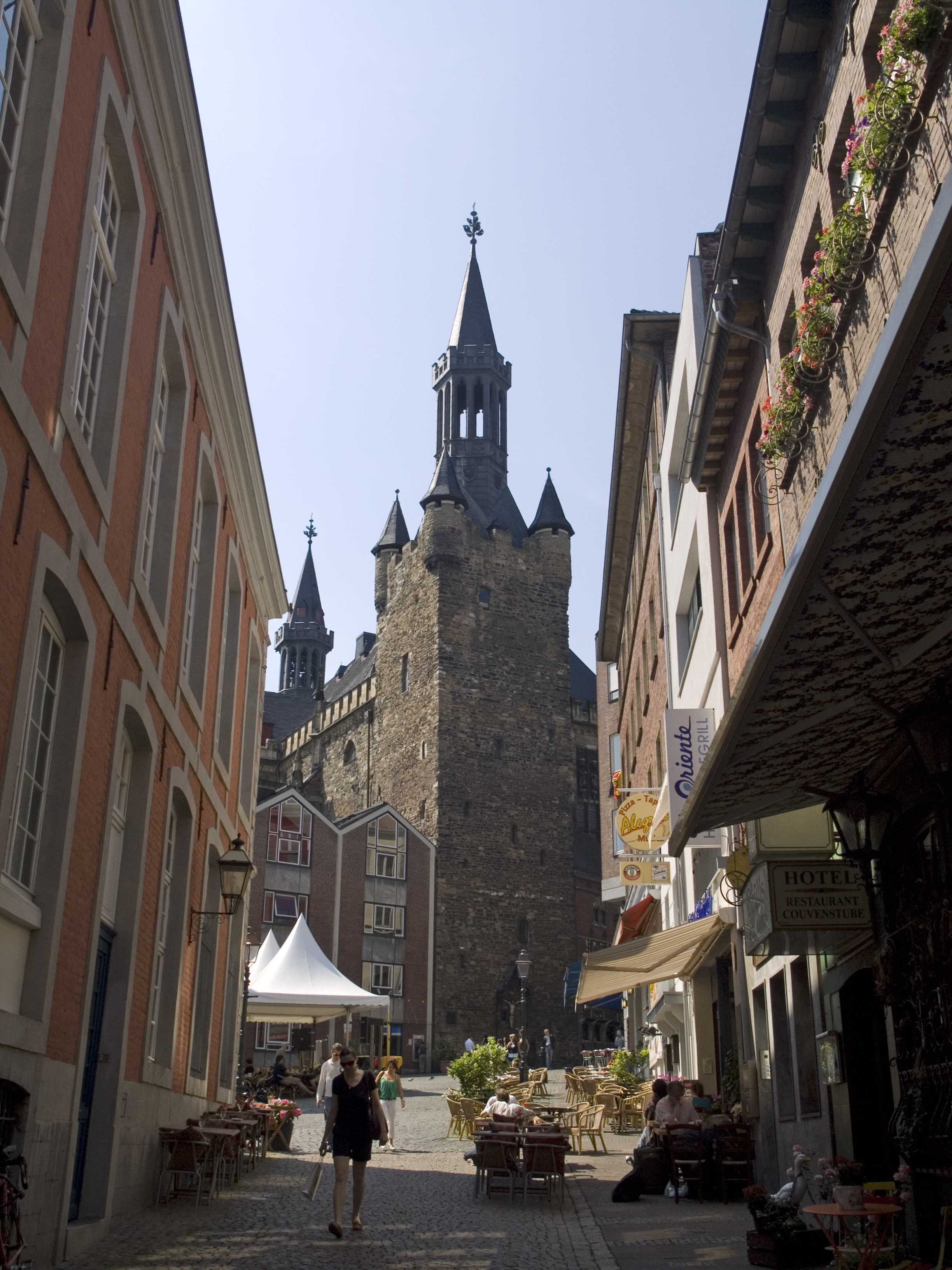 Северный Рейн - Вестфалия, Ахен - Ратуша (башня Granusturm)